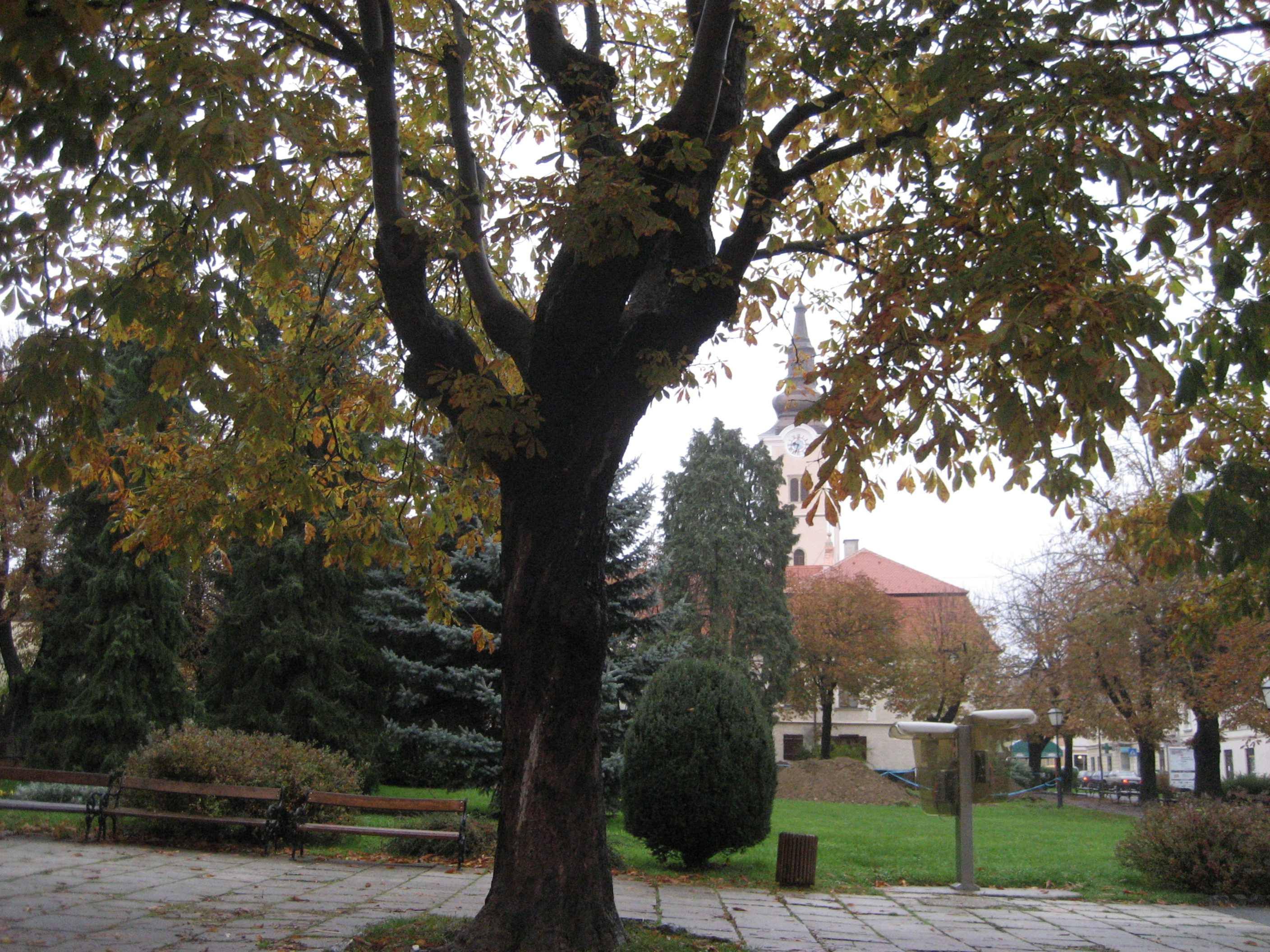 Central Parc in Krizevci